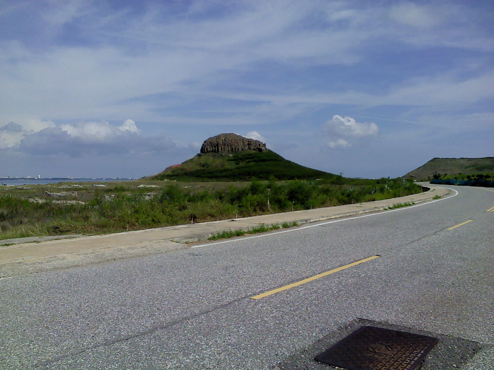 中文（台灣）: 澎湖西嶼牛心山